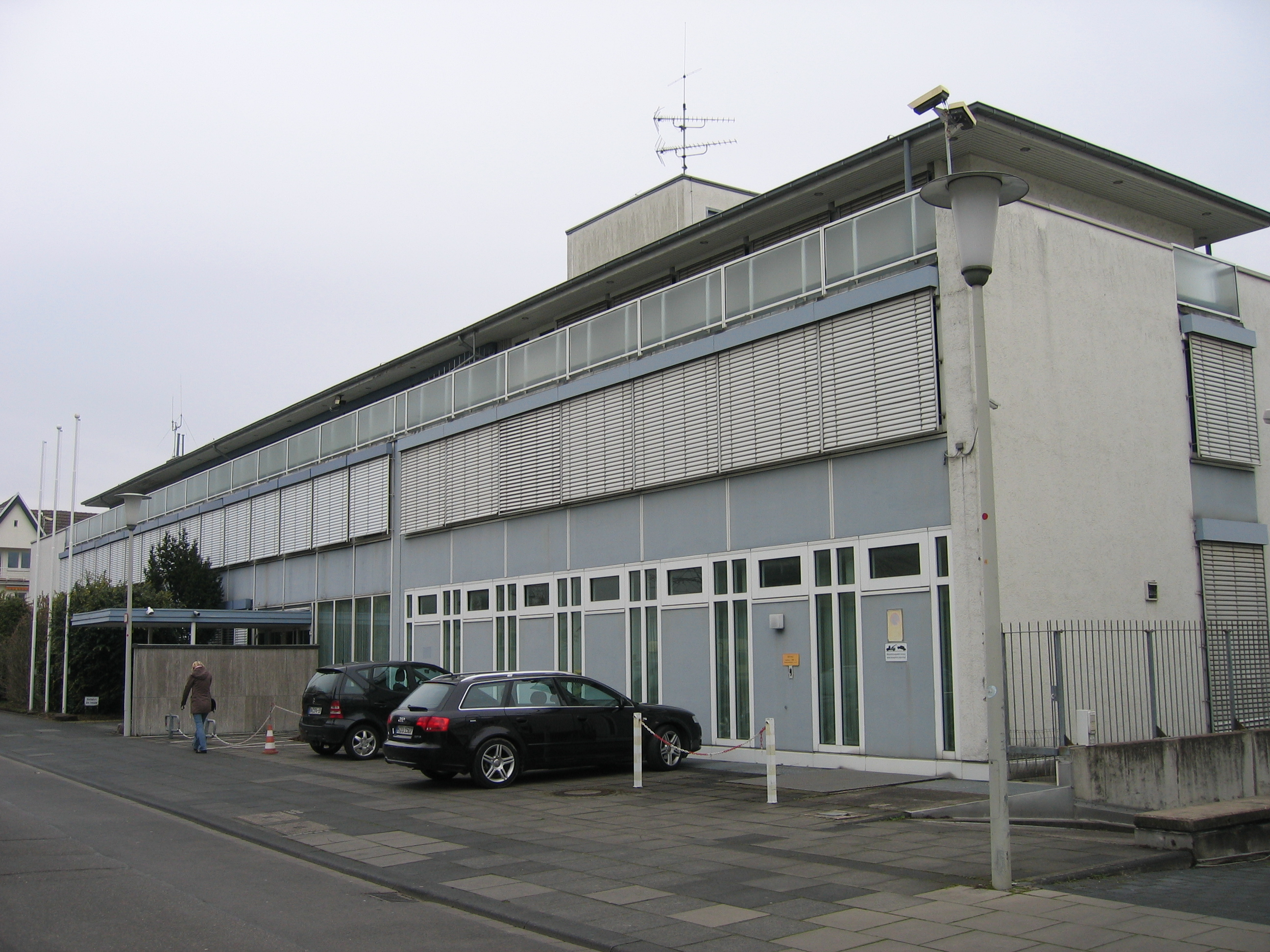 Ehemalige Bayerische Landesvertretung in Bonn-Gronau